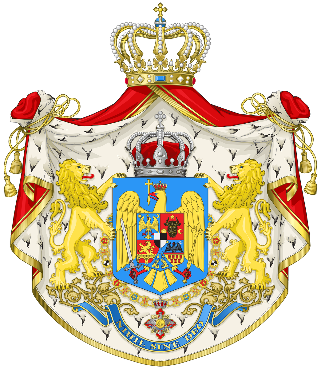 Stema Regatului Romaniei, 1921, realizata de Razvan Pala.